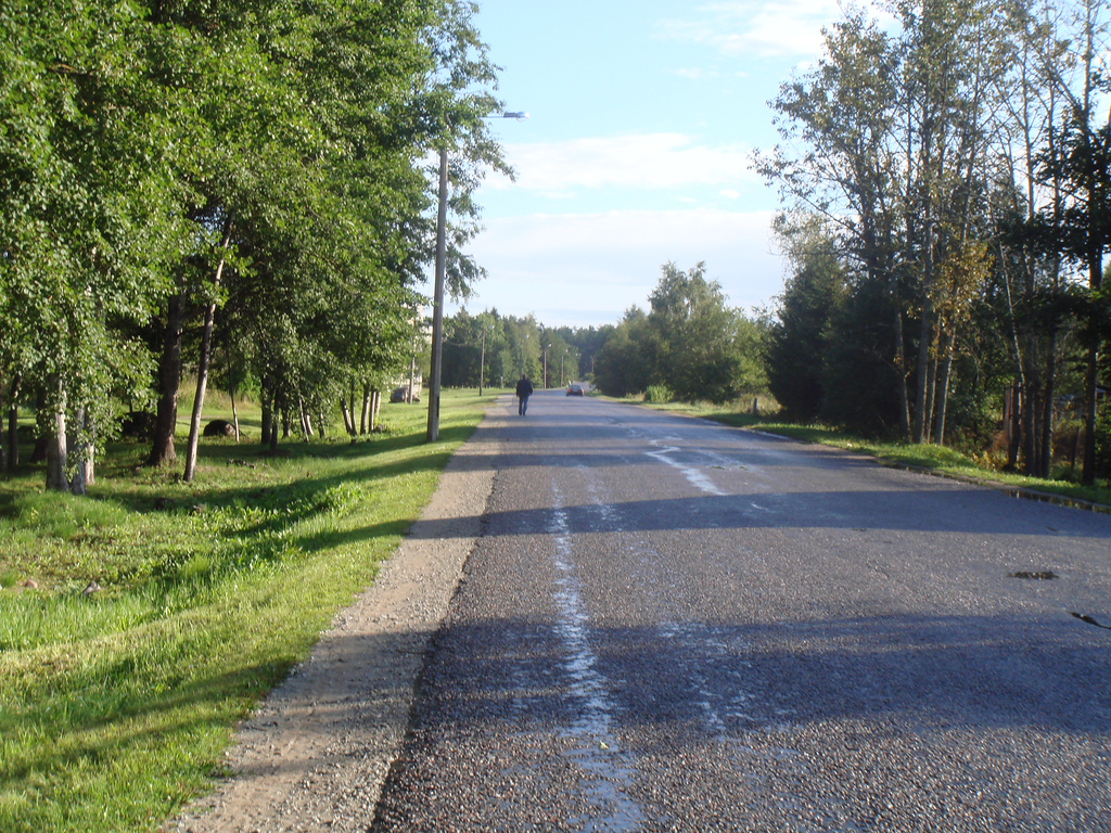 Rohuaia street in Loksa, Estonia.